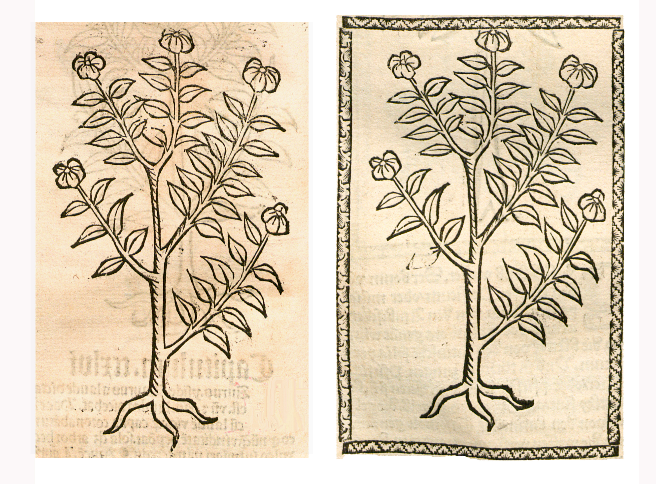 Abbildung von: Pfirsich Blüet (Prunus persica)